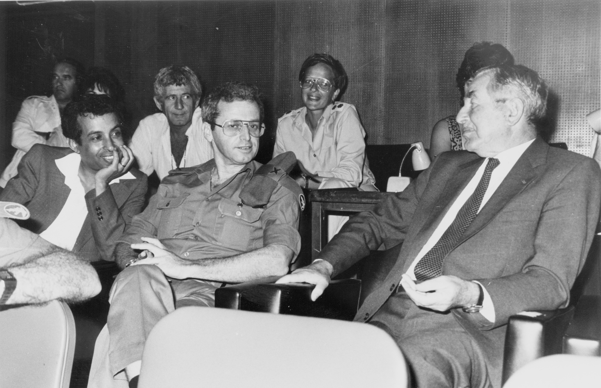 נשיא המדינה חיים הרצוג מקבל הסרטת בכורה של הסרט שתי אצבעות מצידון עם סגל דובר צה"ל אפרים לפיד. נוכחים:תומס תום פרידמן, אז כתב ניו-יורק טיימס בישראל, סא"ל אסנת מרדור ראש ענף ביחידת דובר צה"ל, מנחם דיגלי לשעבר מפקד סיירת מטכ"ל, תא"ל אפרים לפיד דובר צה"ל ועמי גלוסקא מנהל לשכת הנשיא.